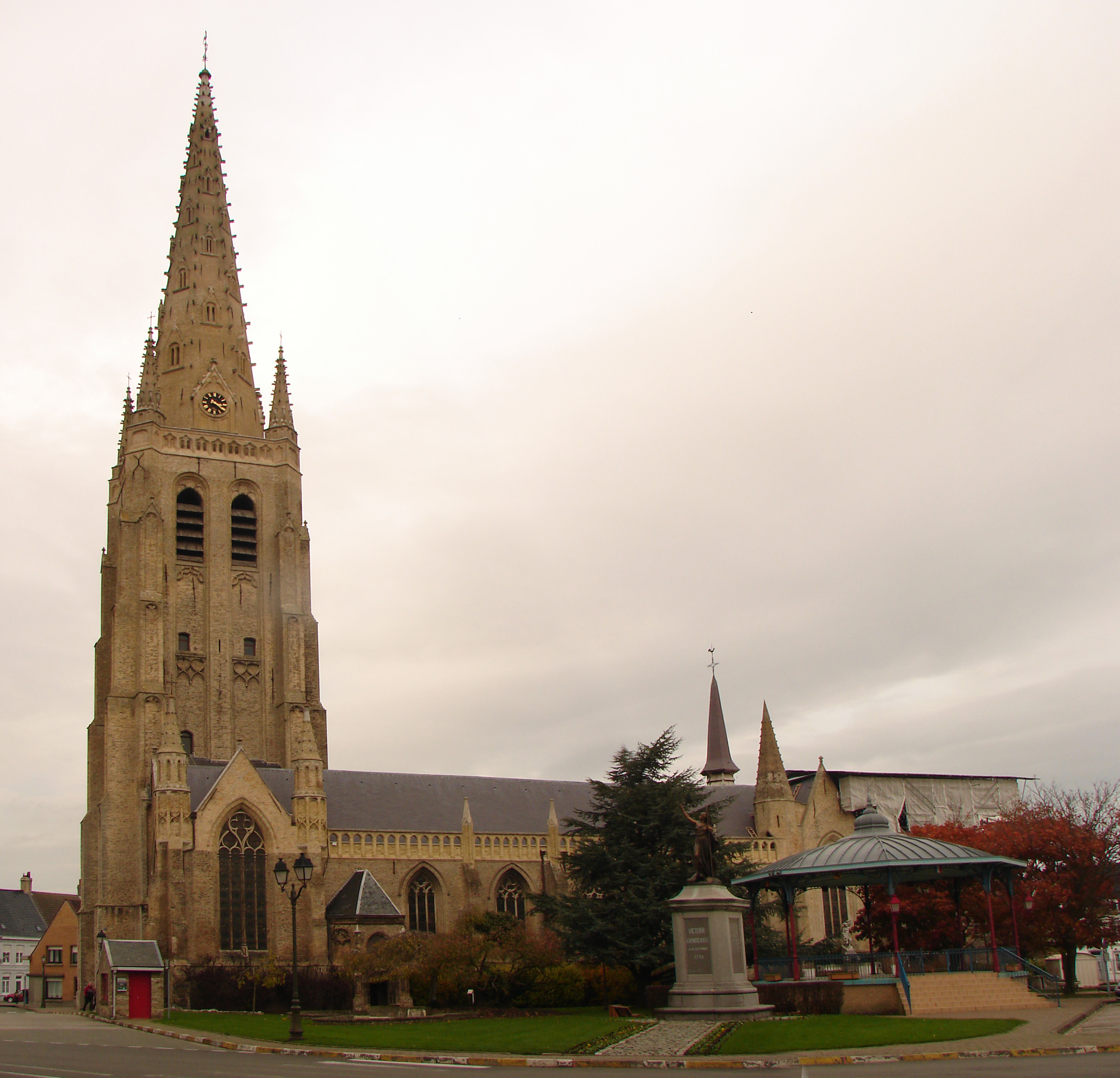 Église Saint-Vaast de Hondschoote .